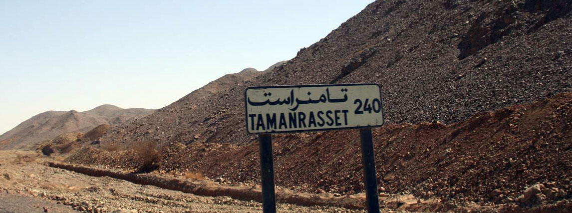 Panneau d'indication au bord de la Transsaharienne, entre In Salah et Tamanrasset. Photo prise par mes soins en janvier 2009, libre de droits.